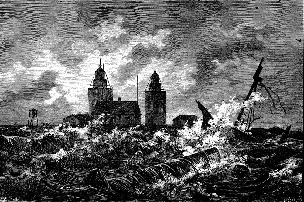 Nidingens fyr